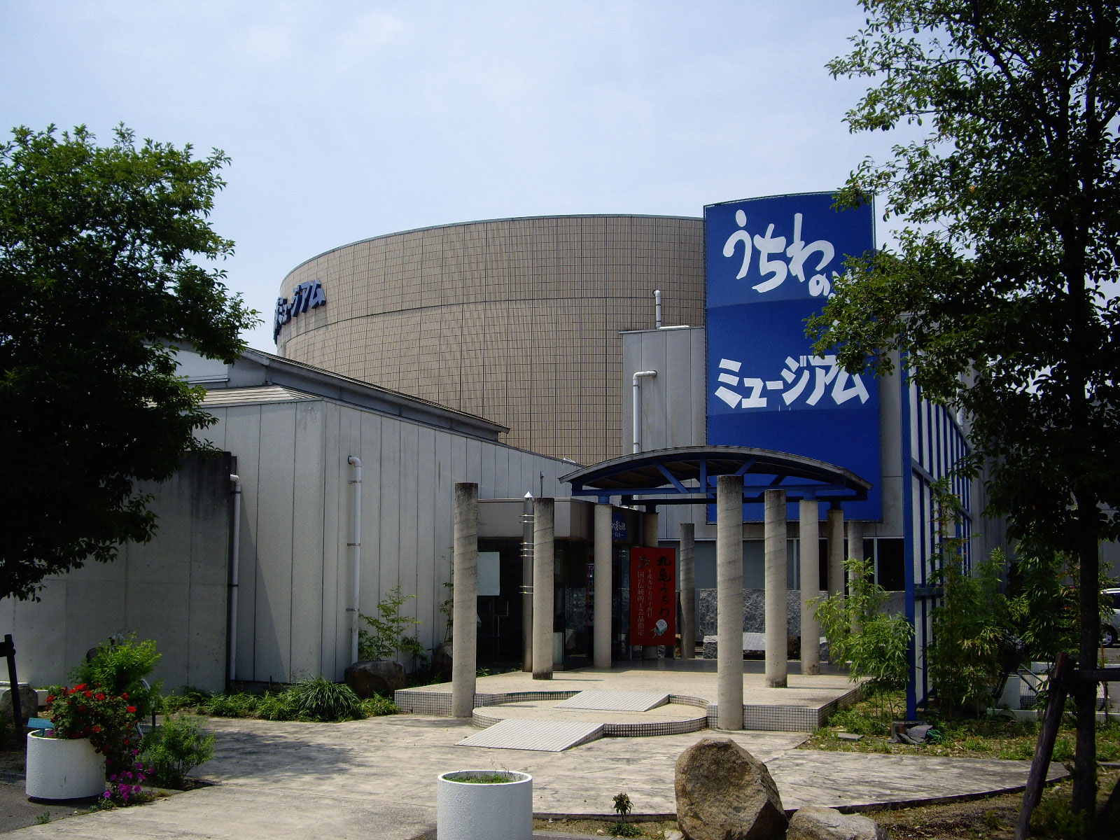 丸亀市うちわの港ミュージアム - 日本国香川県丸亀市